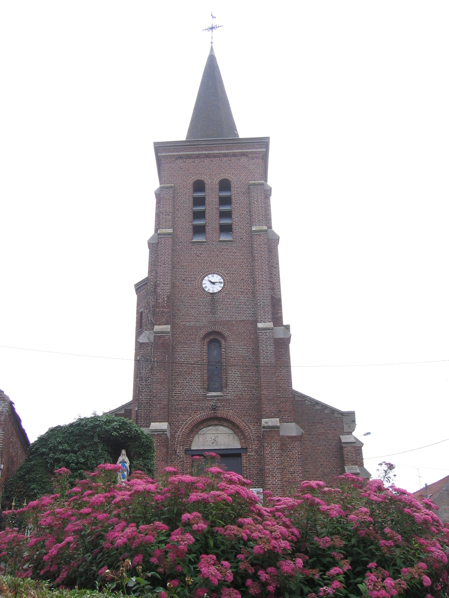 Eglise de monchaux sur écaillon